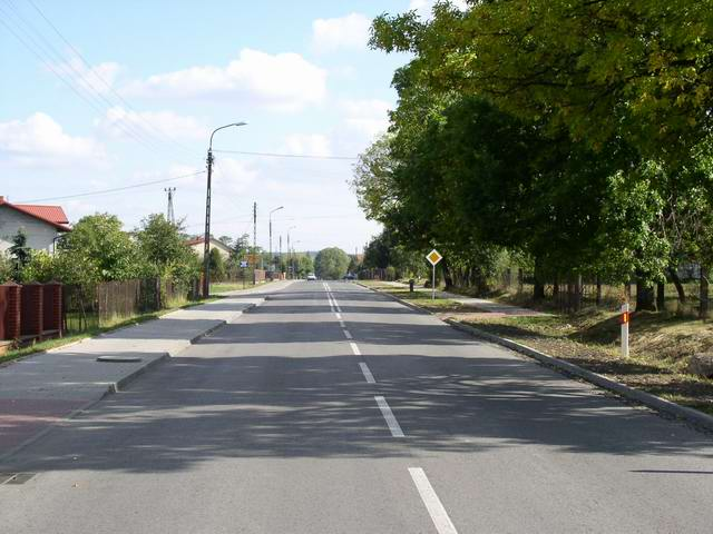 Szydłowiec - ulica gen. Sowińskiego